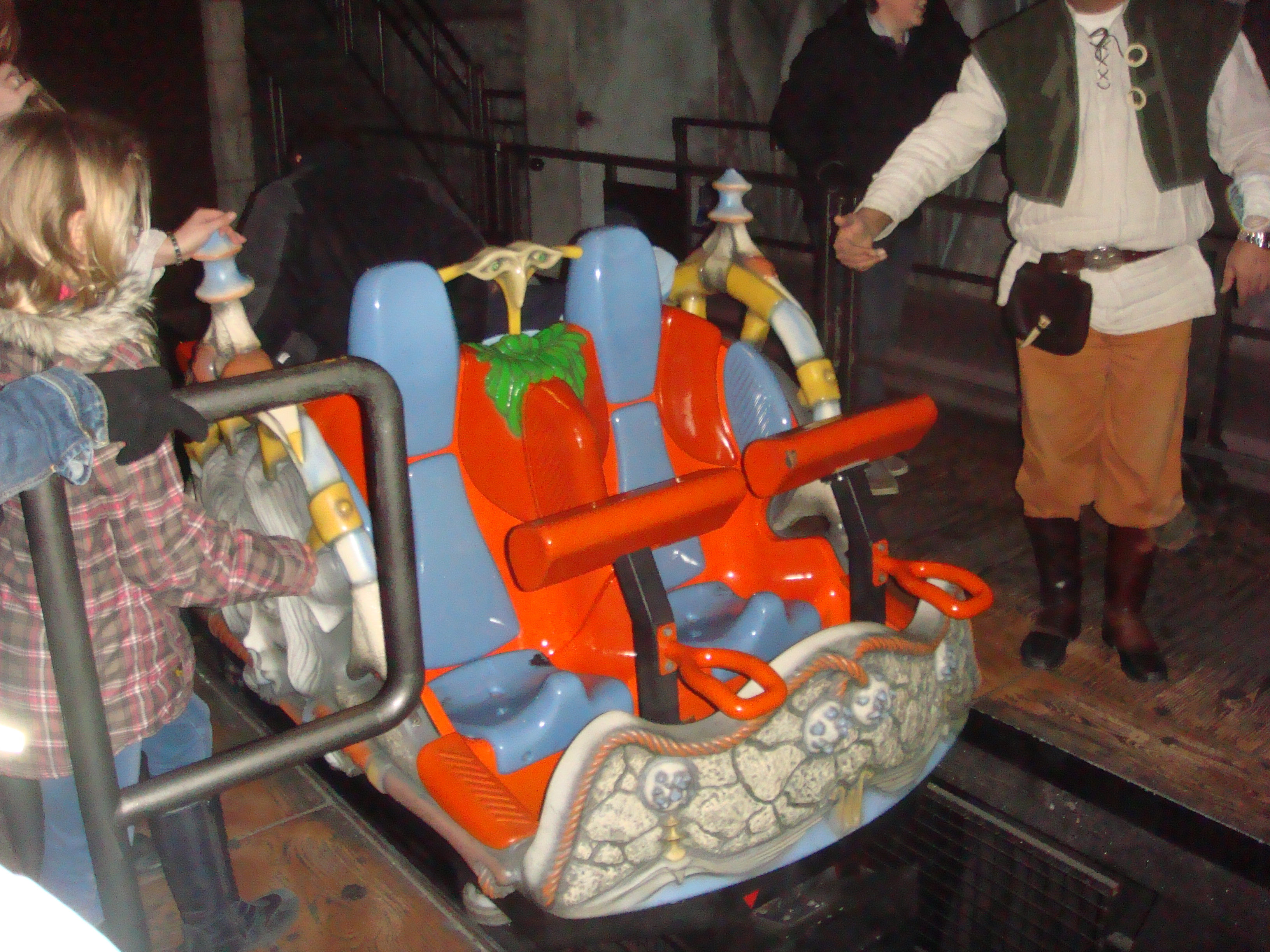 Winjas-Wagen in der Station